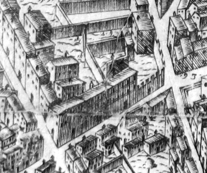 Pianta del buonsignori, 1594, palazzo pucci